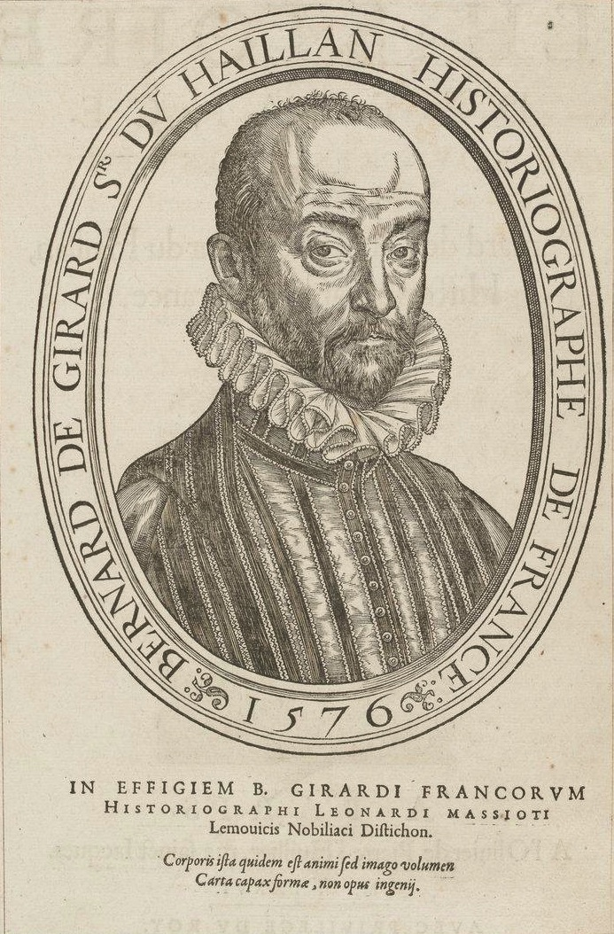 portrait de Bernard de Girard du Haillan